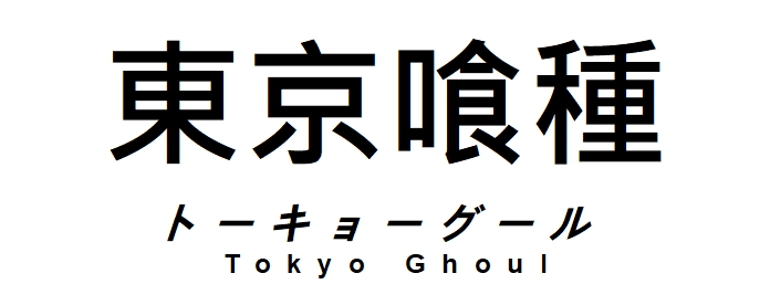 Replica monocromatica del logo dell'anime e manga Tokyo Ghoul